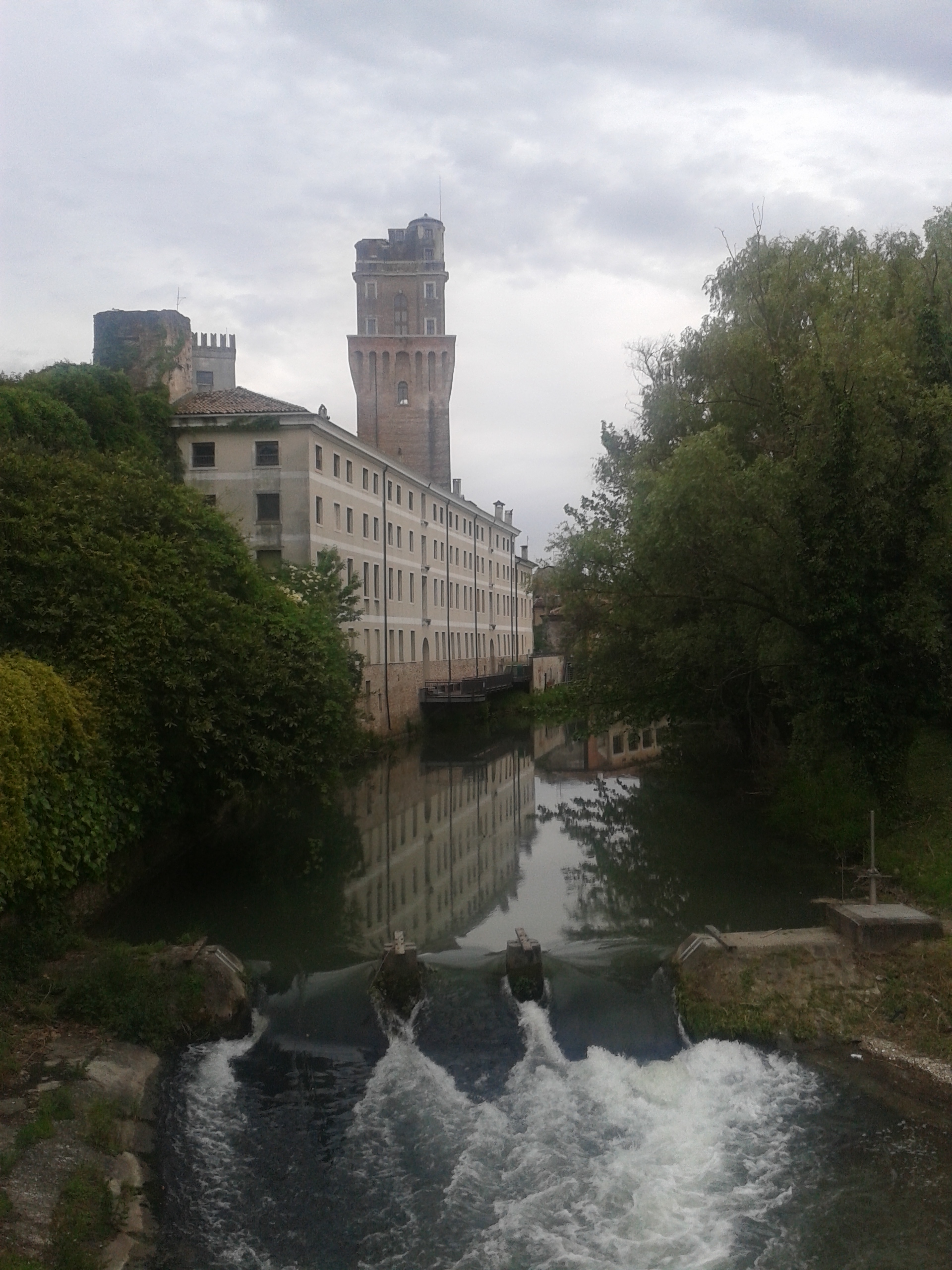 Veduta della torre della Specola di Padova fotografata dal Ponte San'Agostino Licensing